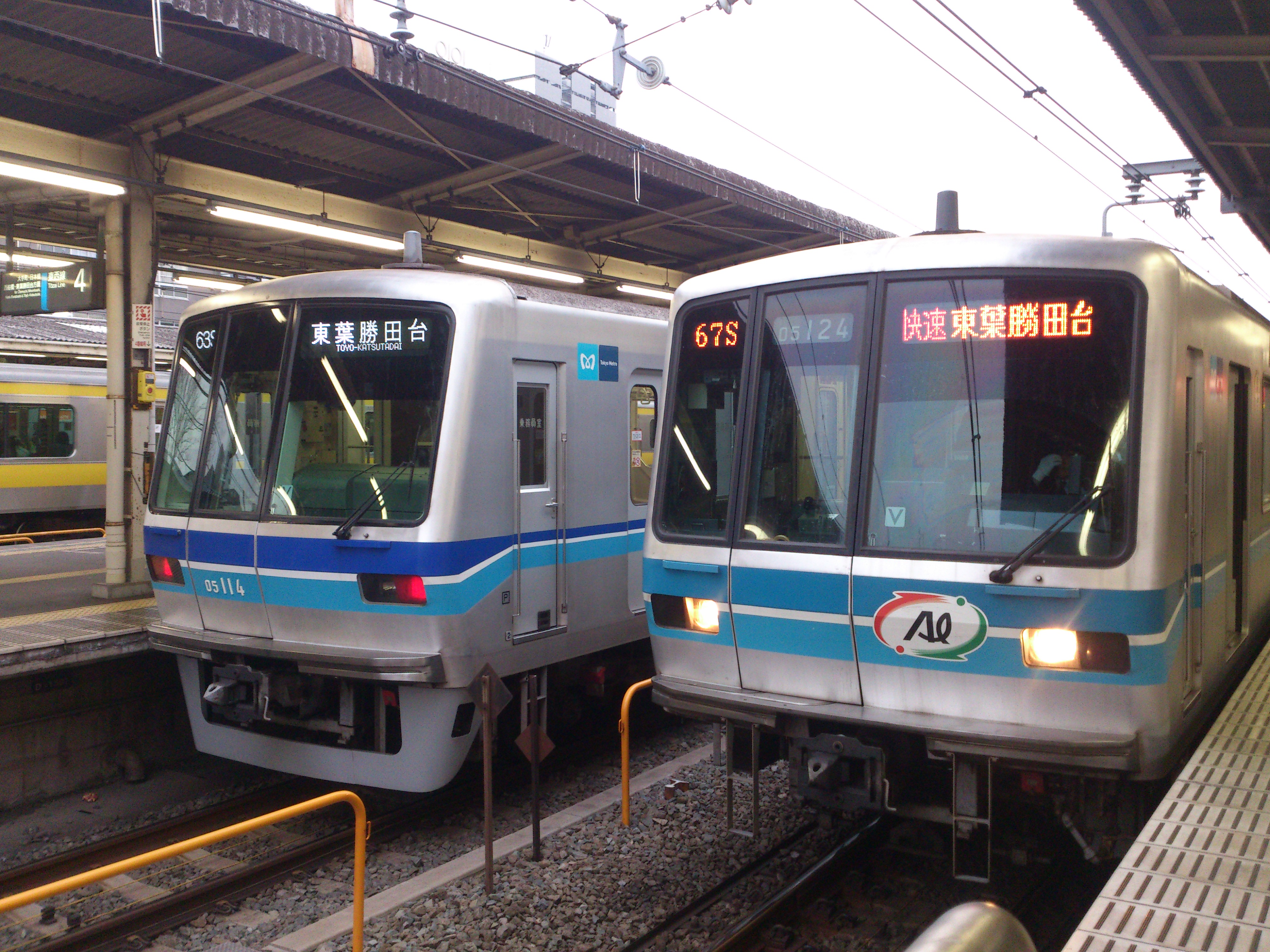 中野駅で並んだ第１４編成（Ｂ修車）と第２４編成。